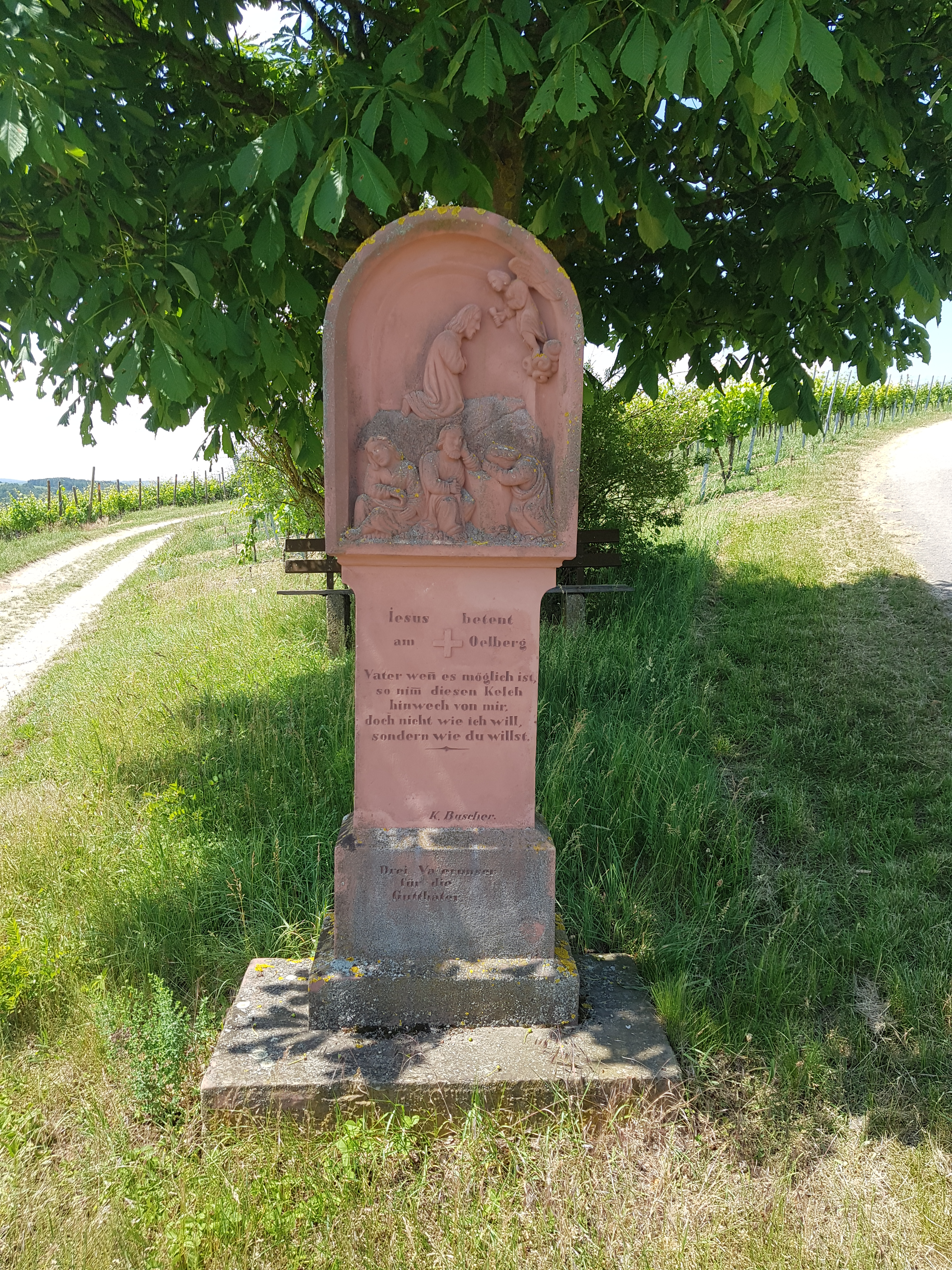 Kreuzweg (Uissigheim) - Station 00 - Jesus betet am Oelberg